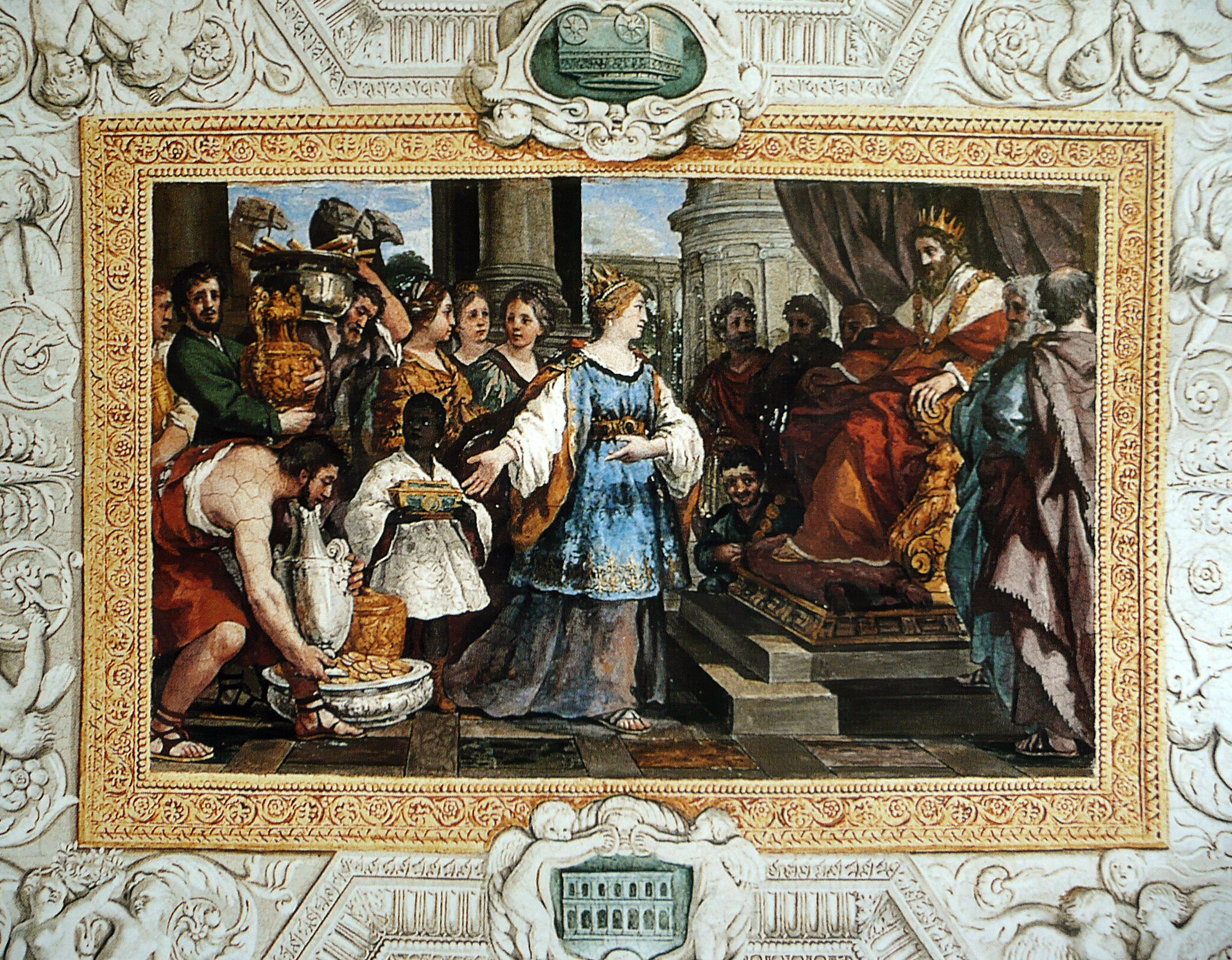 La Rencontre de Salomon et de la reine de Saba